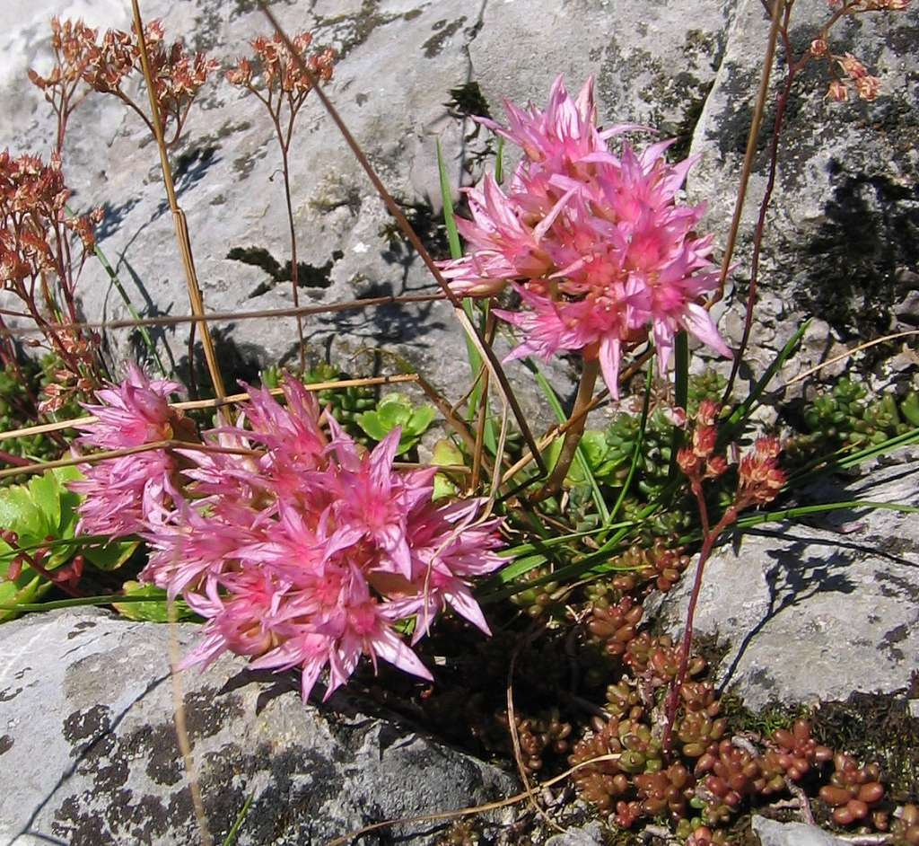 Kaukasus-Fetthenne (Phedimus spurius) Fundort: Hintereggeralm, Steiermark, Österreich